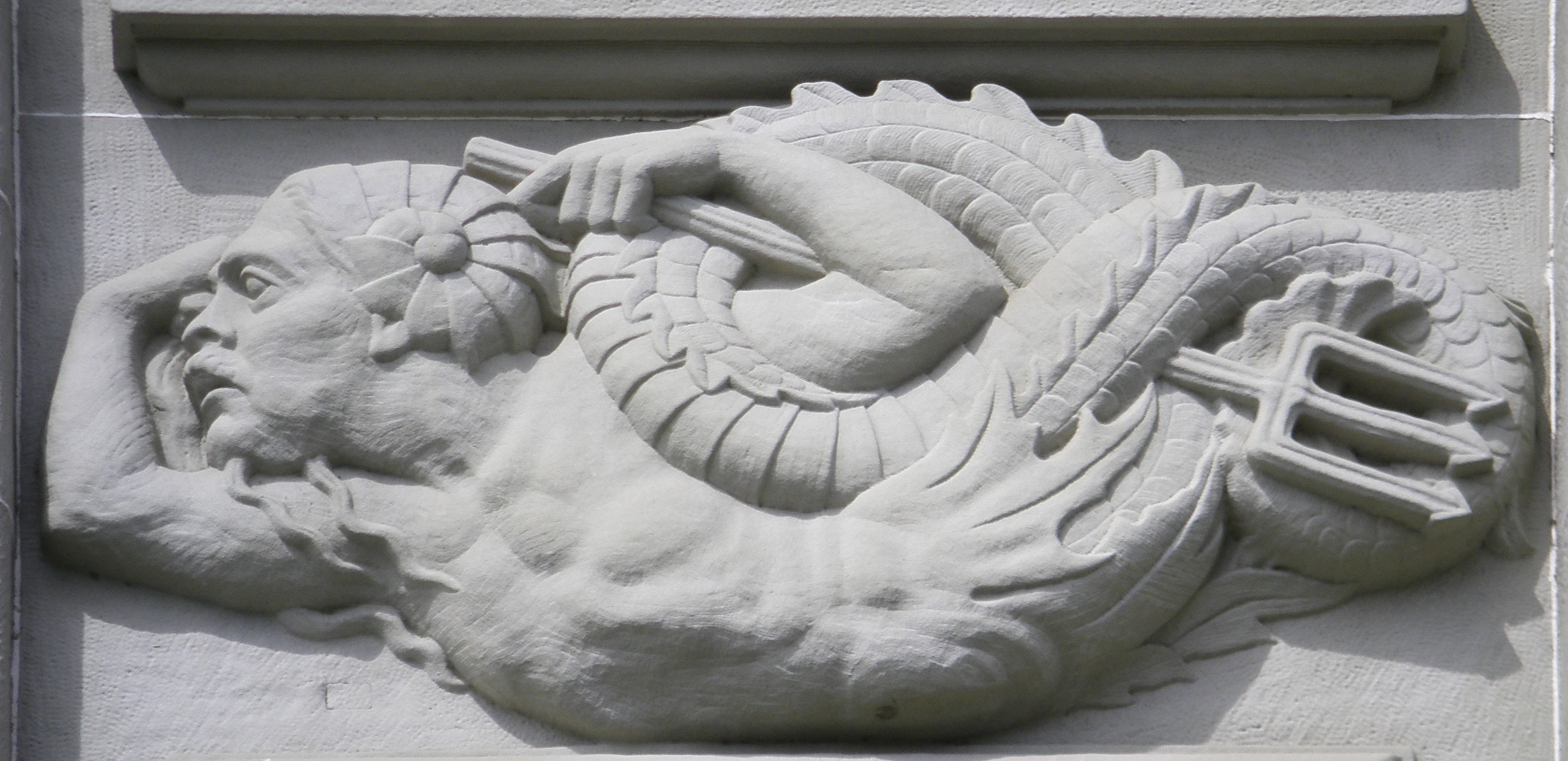 Gebäudedekorationen von Karl Hänny (1879-1972) am Hauptsitz der Bernischen Kraftwerke, Viktoriaplatz, Bern, Schweiz.